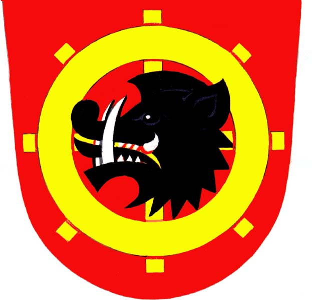 Znak obce Kunemil